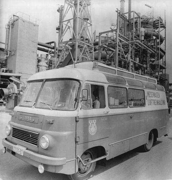 Schwarzheide, VEB Synthesewerk, Messwagen für Luftverschmutzung ADN-ZB Link 14.2.1978 hsch-Bez. Cottbus: Systematische Kontrollen der Luft werden von der Arbeitsgruppe Abluftanalytik der Abteilung Umweltschutz des VEB Synthesewerk Schwarzheide im Gelände des PUR-Komplexes mit einem lufthygienischen Meßwegen vorgenommen. Die Reinhaltung der Luft ist eine ständige Aufgabe der Staats- und Wirtschaftsorgane sowie der Betriebe in die Kontrolle der Luftverunreinigungen einbezogen. Nach der 5. Durchführungsbestimmung zum Landeskulturgesetz erhalten Betriebe Auflagen für die Ausrüstung und den Betrieb von Meßpunkten durch die Organe der staatlichen Hygiene- und Arbeitsschutzinspektionen, insbesondere zur Eigenkontrolle des Schadstoffauswurfs.